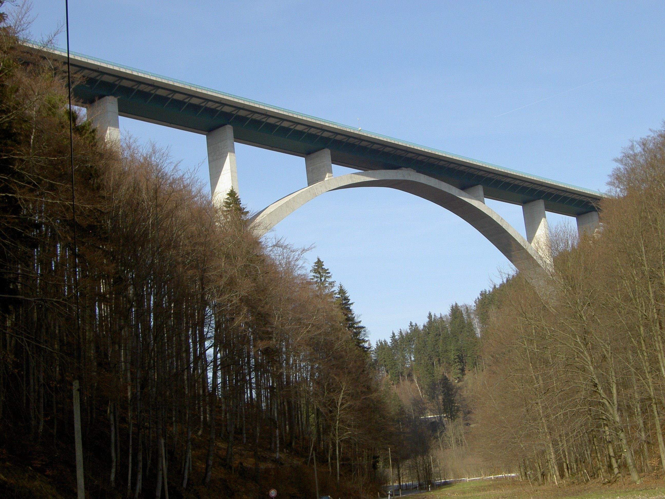 Talbrücke Wilde Gera, Ilm-Kreis